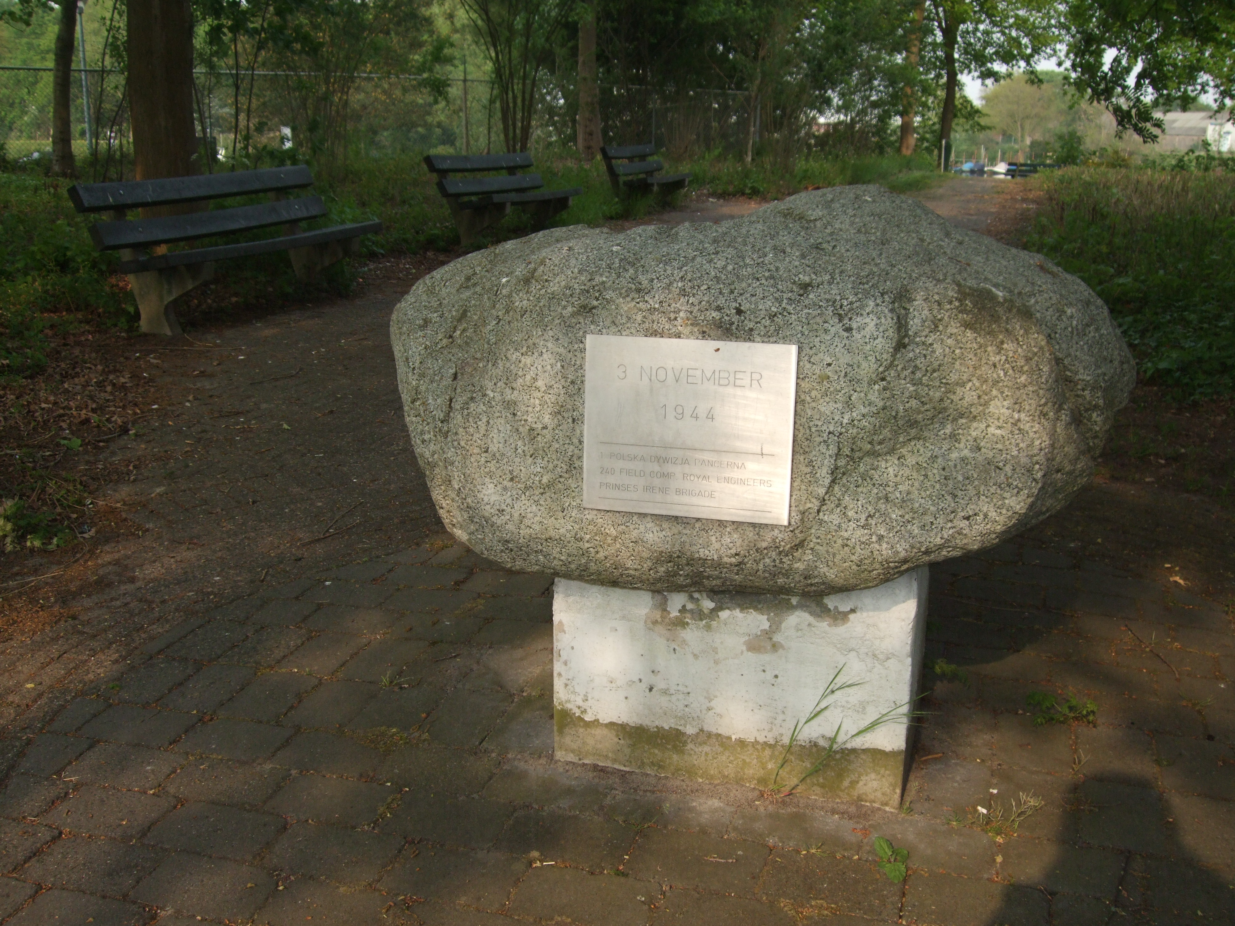 Het 'Monument voor Poolse militairen' in Oosterhout is een zwerfkei met op de voorzijde een ijzeren plaquette. Het monument bevindt zich aan de Korenbocht,in de nabijheid het Markkanaal in Oosterhout.